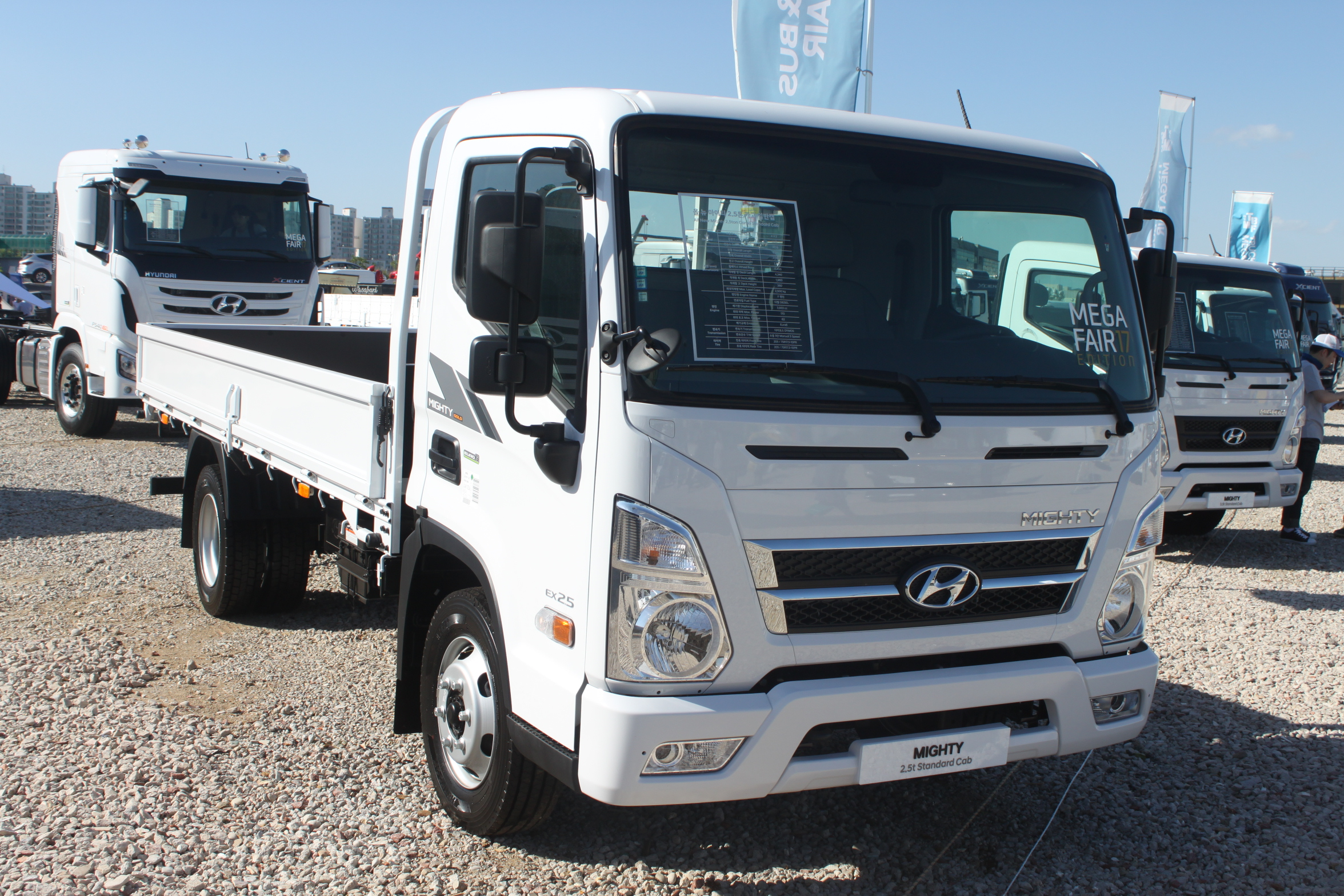 현대 올 뉴 마이티(3세대) 정측면